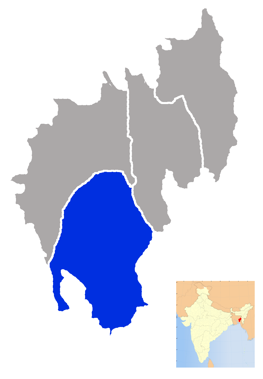 Tripura south disctrict